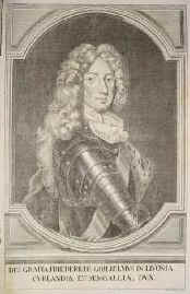 Friedrich Wilhelm Kettler, KUPFERSTICH: A. Reinhard sc., um 1710